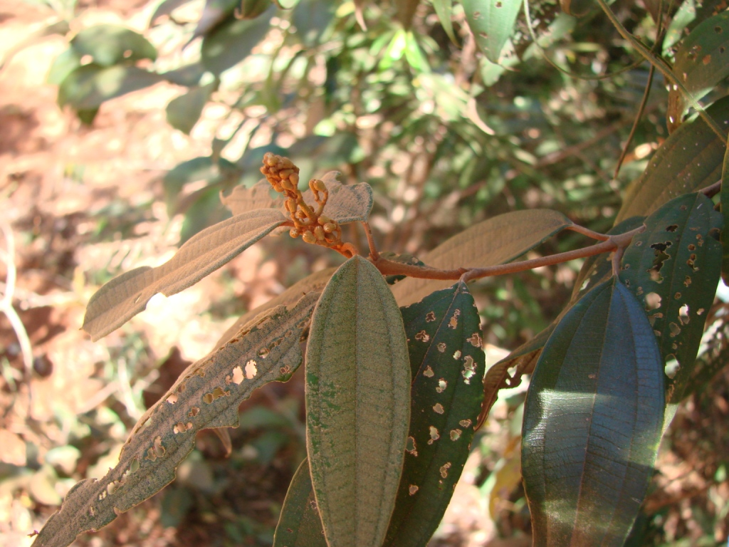 Miconia burchellii, Melastomataceae - Brasilien/Brasil: Distrito Federal, Jardim Botanico de Brasília